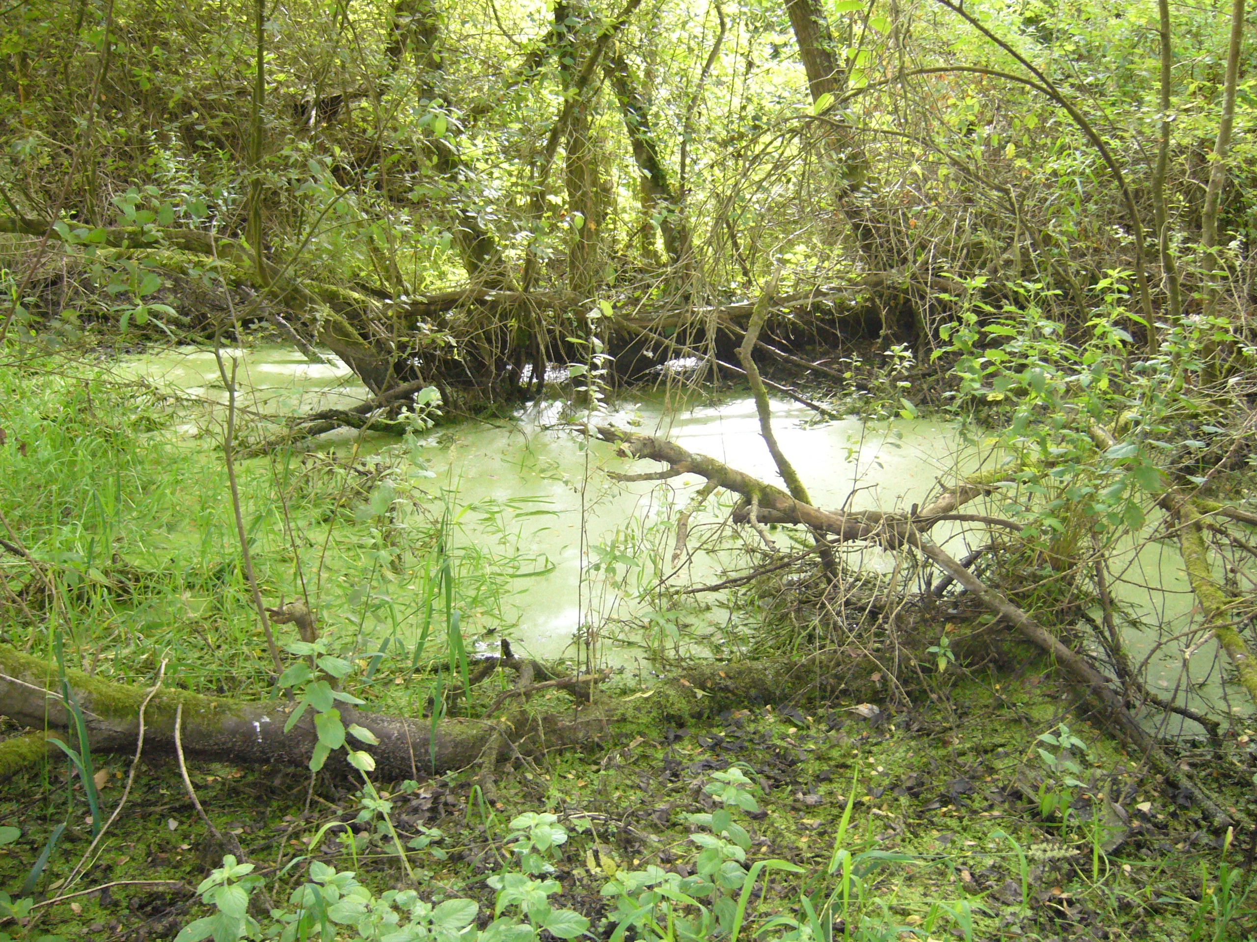 Marécage dans la Petite Amazonie nantaise.